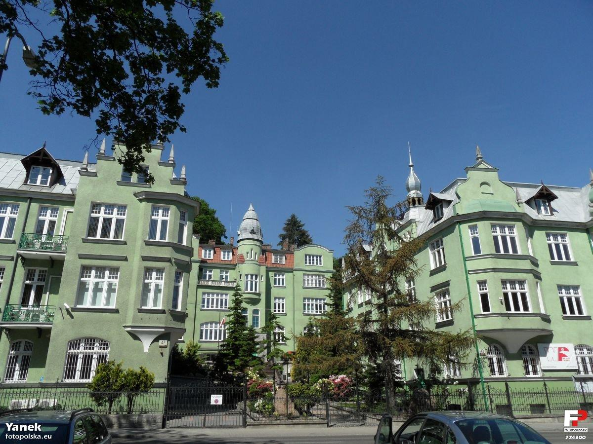 Kompleks WSzW w Gdańsku. Z lewej "biura emerytalne" pod nr 47, z prawej pod nr 43, stowarzyszenia kombatanckie, na wprost nr 45.